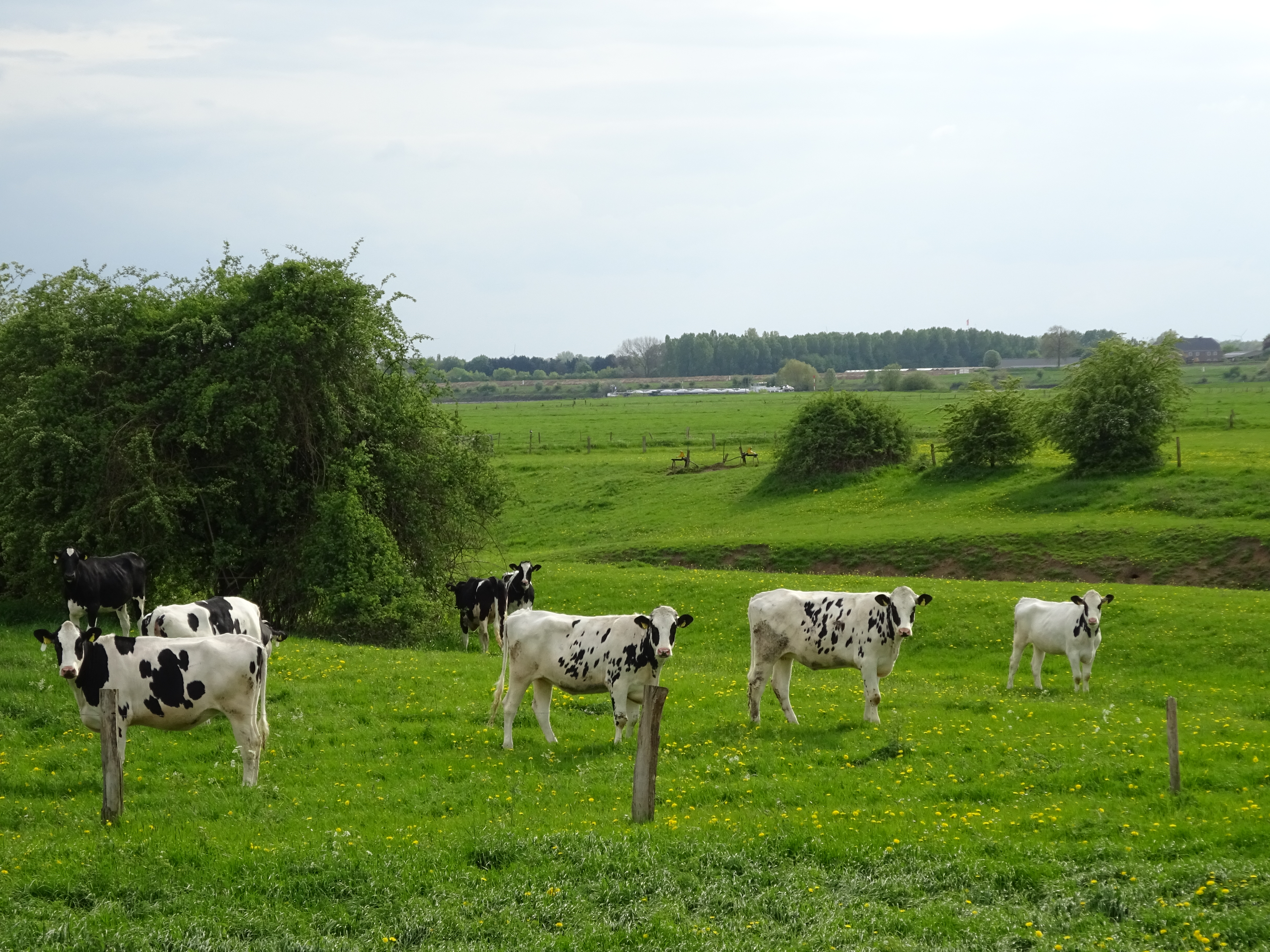 Rees-Reeserward, jong vee in NSG Grietherorter Altrhein, op de achtergond een ship op de Rijn